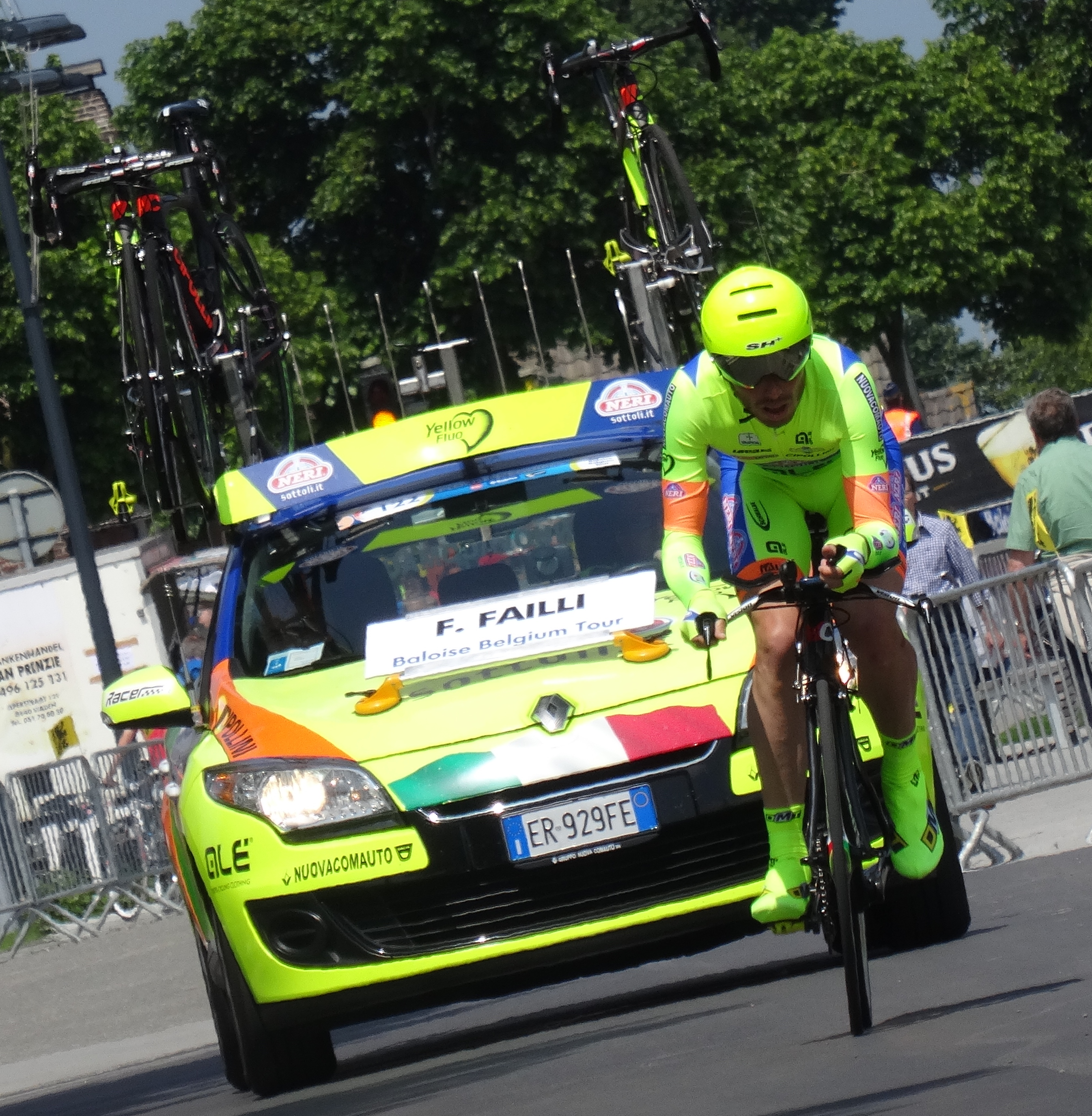 Reportage photographique réalisé le vendredi 30 mai à l'occasion du contre-la-montre individuel de la troisième étape du Tour de Belgique 2014 à Dixmude, Belgique.